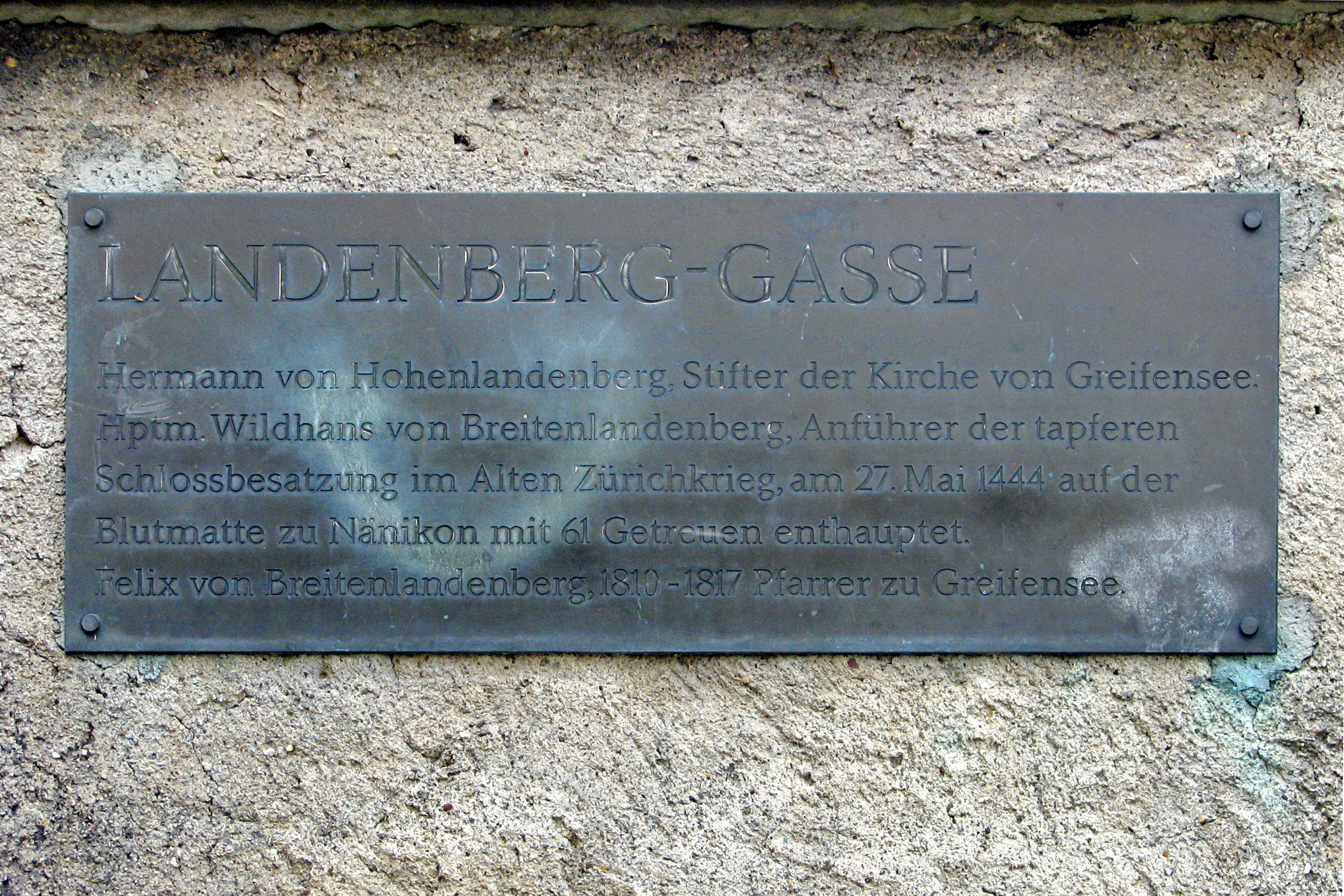 Landenberg memorial in Greifensee (ZH)